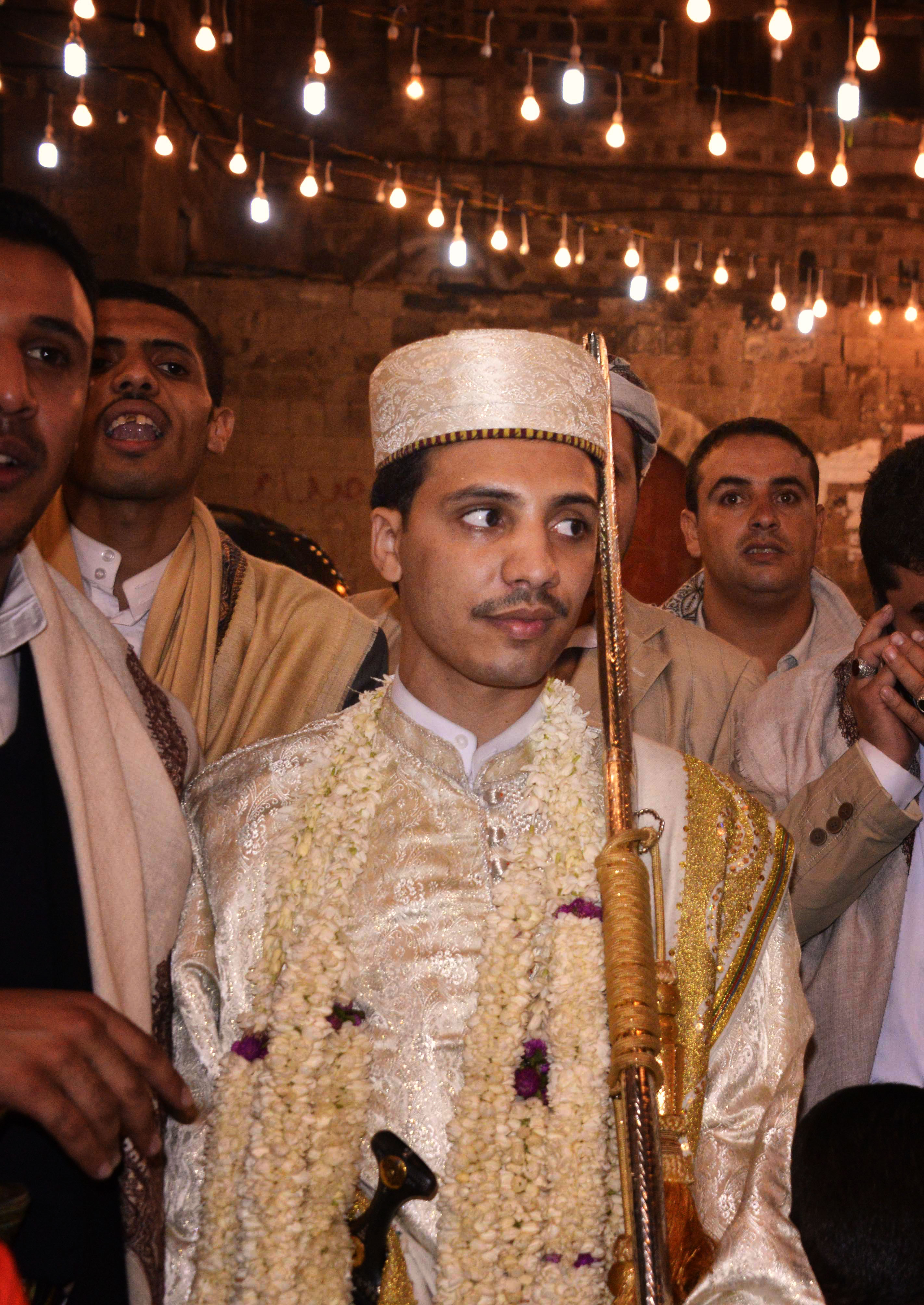 Yemen